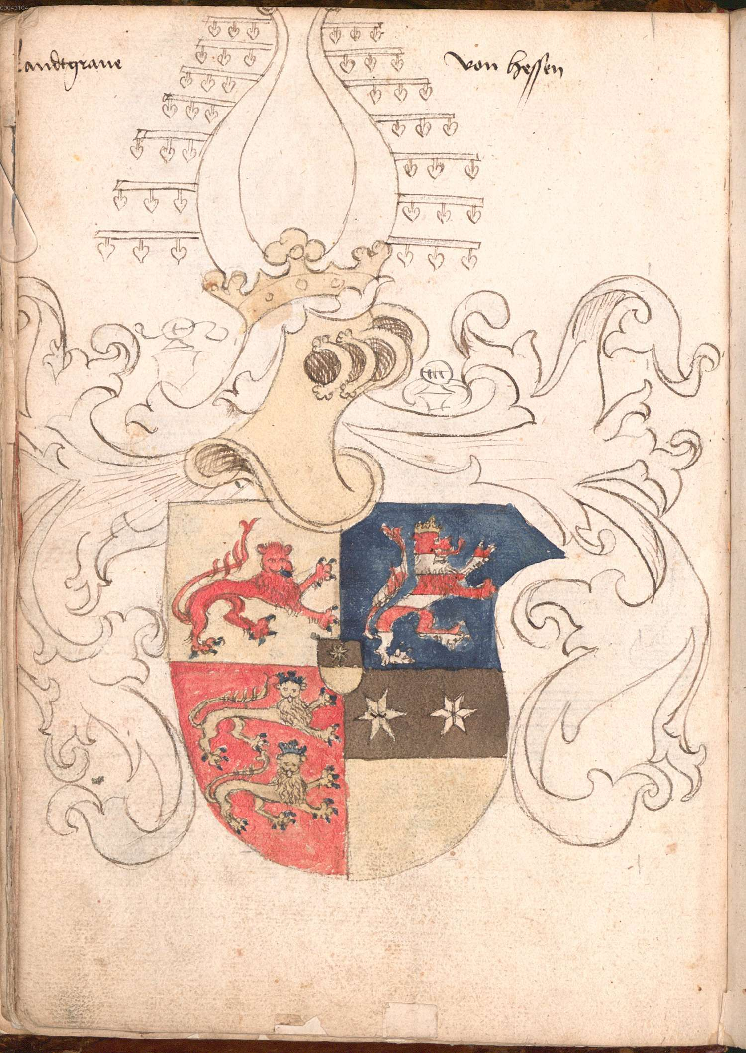 „Wernigeroder (Schaffhausensches) Wappenbuch“; Süddeutschland 4. Viertel 15. Jh. Bayerische Staatsbibliothek München, Cod.icon. 308 n Wappen Landgrafen von Hessen